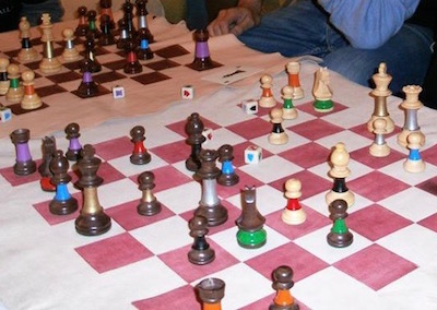 Partida simultánea con fichas de ajedrez heráldico, cartas y dados.